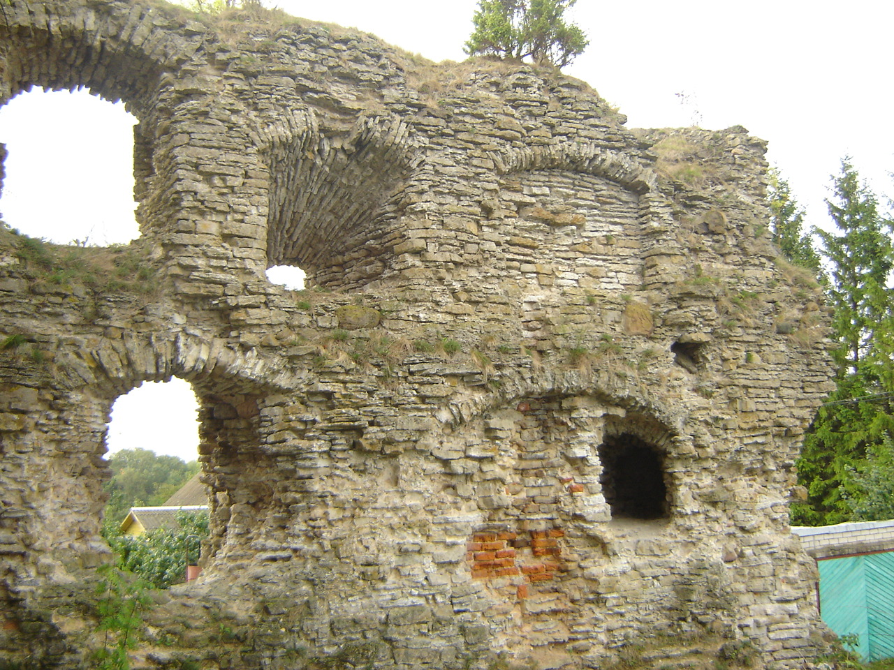 Vasknarva ordulinnus. Linnuse müür ja laskeava.